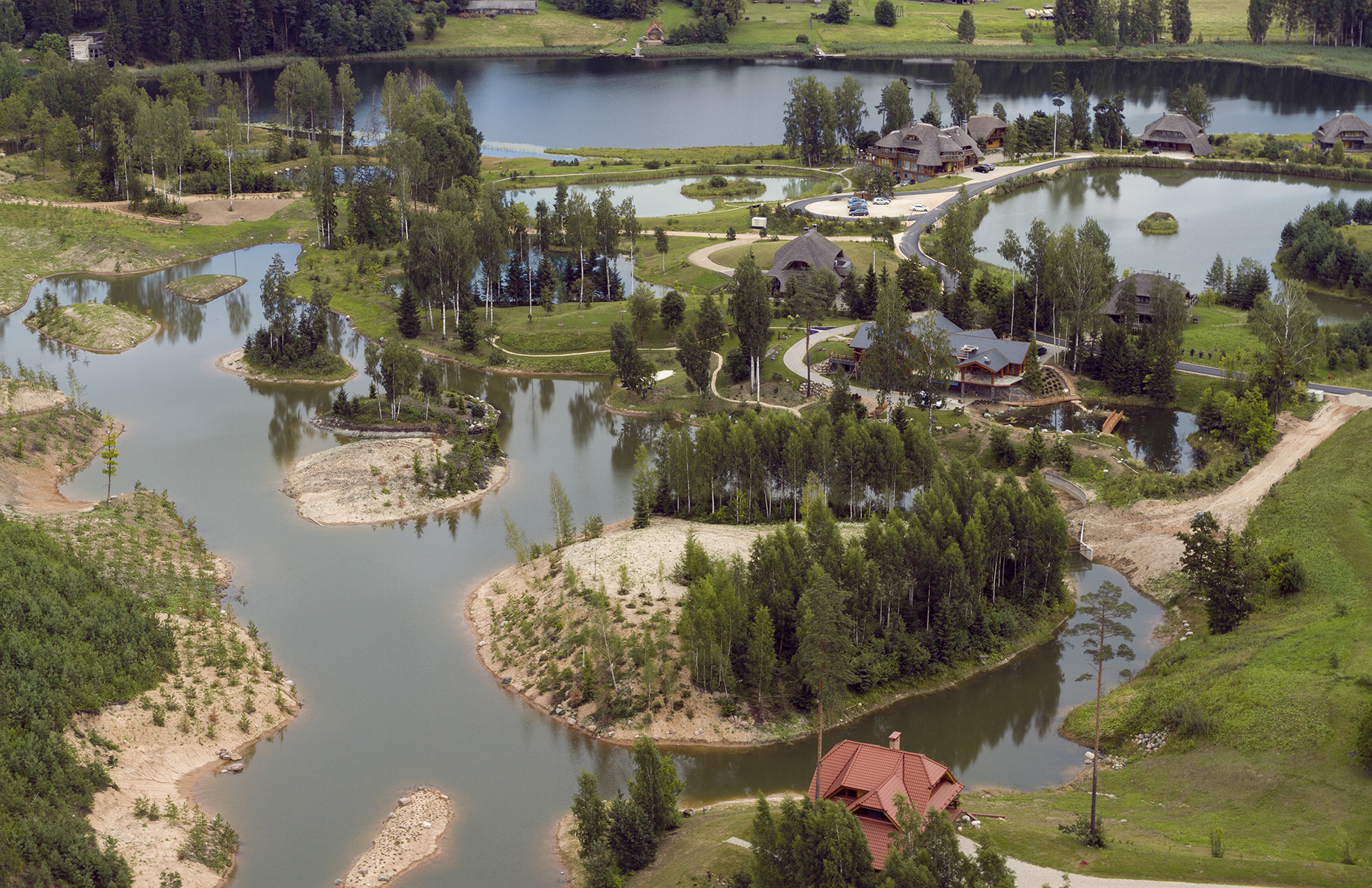 Аматциемс (латыш. Amatciems) — экопоселение в Драбешской волости (Аматский край, Латвия). Является одним из образцов ландшафтной архитектуры.